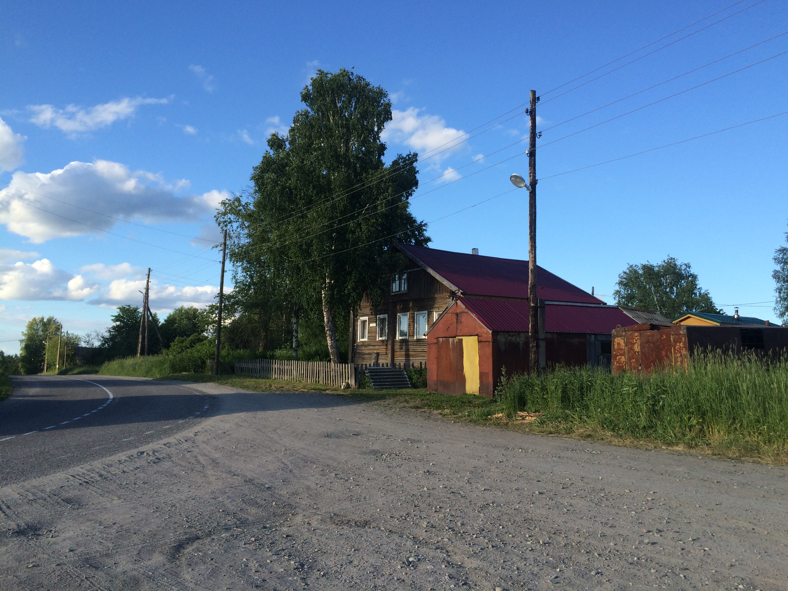 Великая Нива (Карелия)